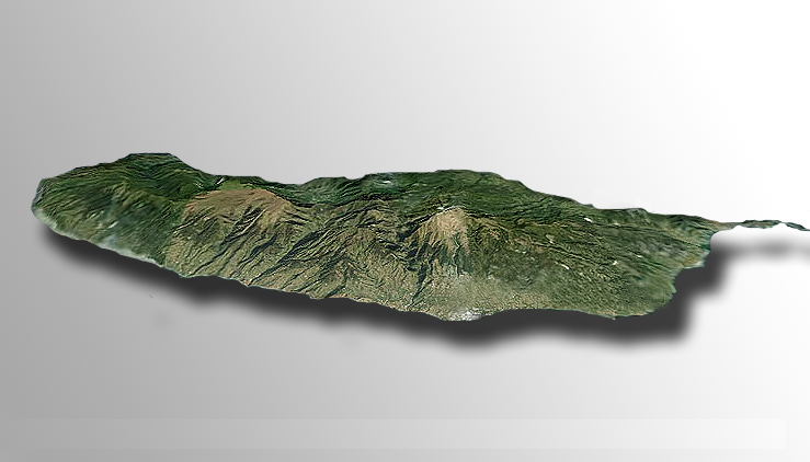 Representação da Ilha da Madeira 3D